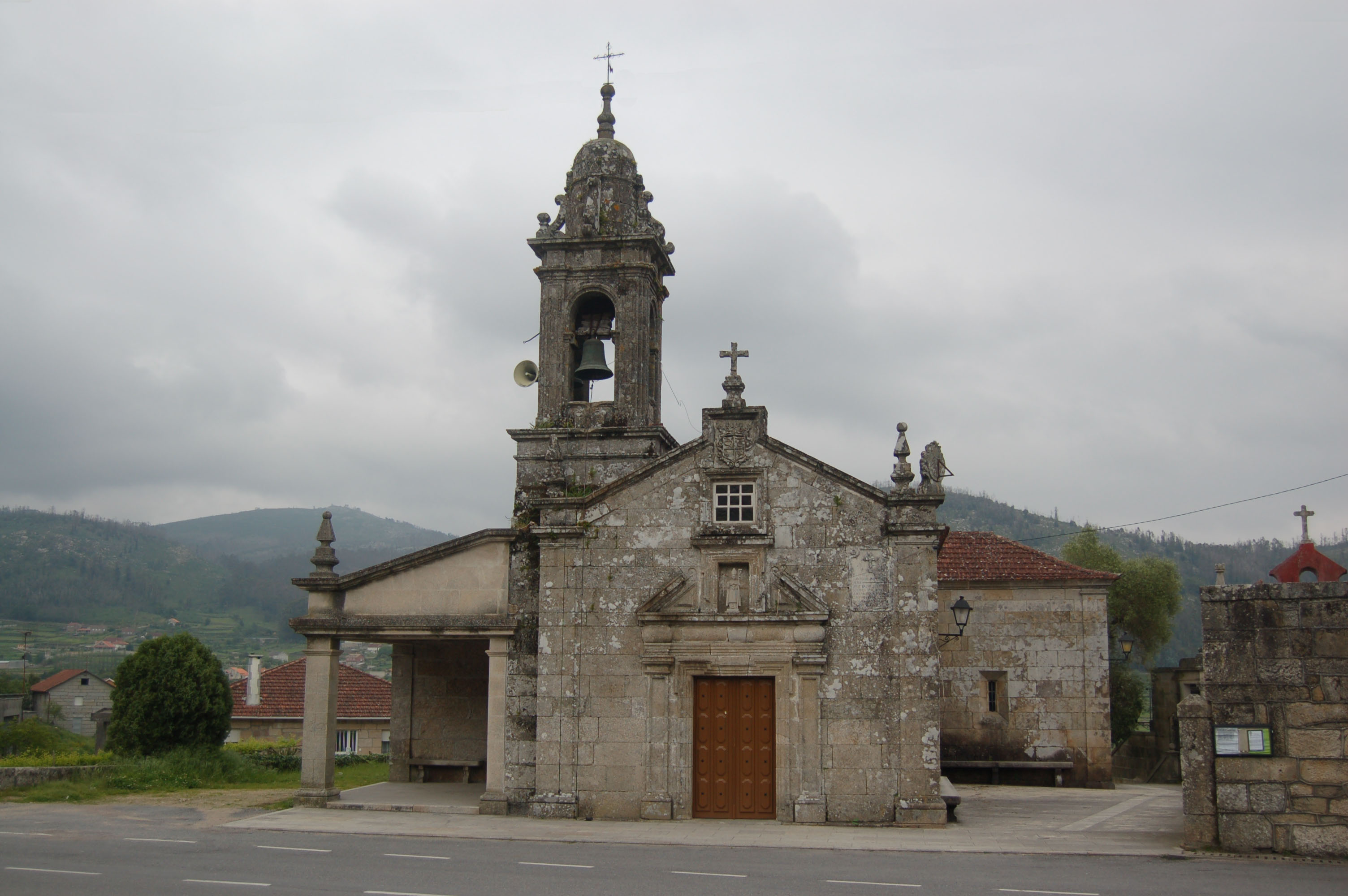 Igrexa parroquial de San Martiño de Verducido (Pontevedra)